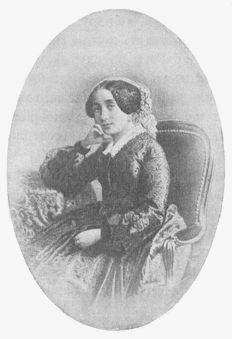 Клеопатра Петровна Клейнмихель, ур.Ильинской (1811-1865), в первом браке Хорват, во втором за П.А.Клейнмихелем (1793-1869). Была статс-дамою, кавалерственною дамою ордена св. Екатерины и председательницею патриотического общества.